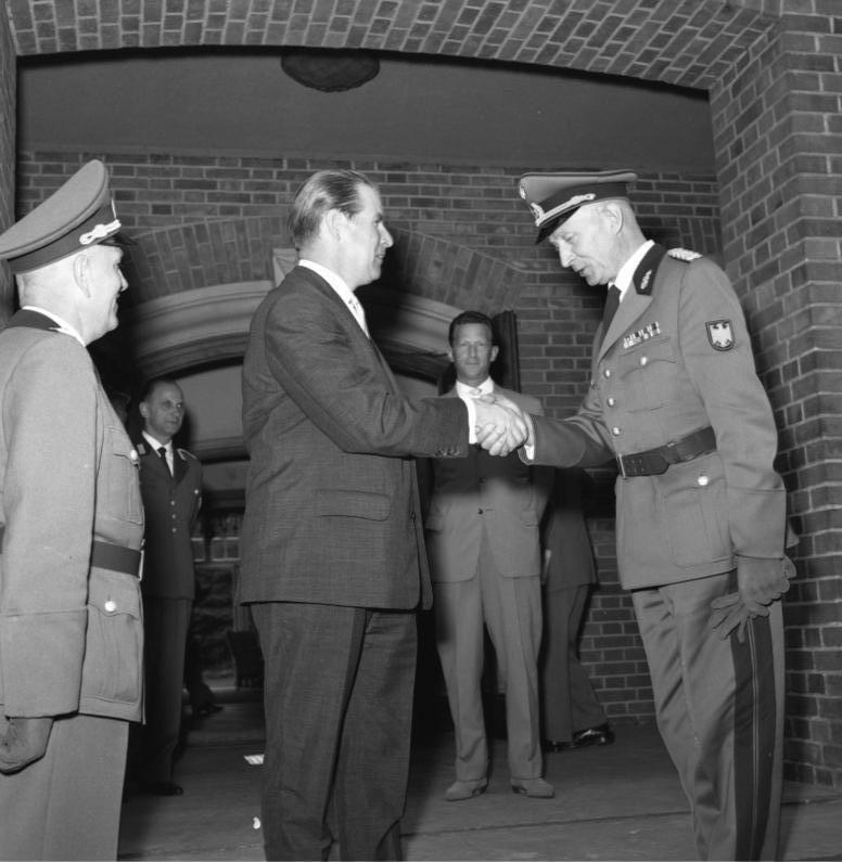 10 jähriges Bestehen des BGS: Essen in der BGS-Schule Hubertus Lübeck